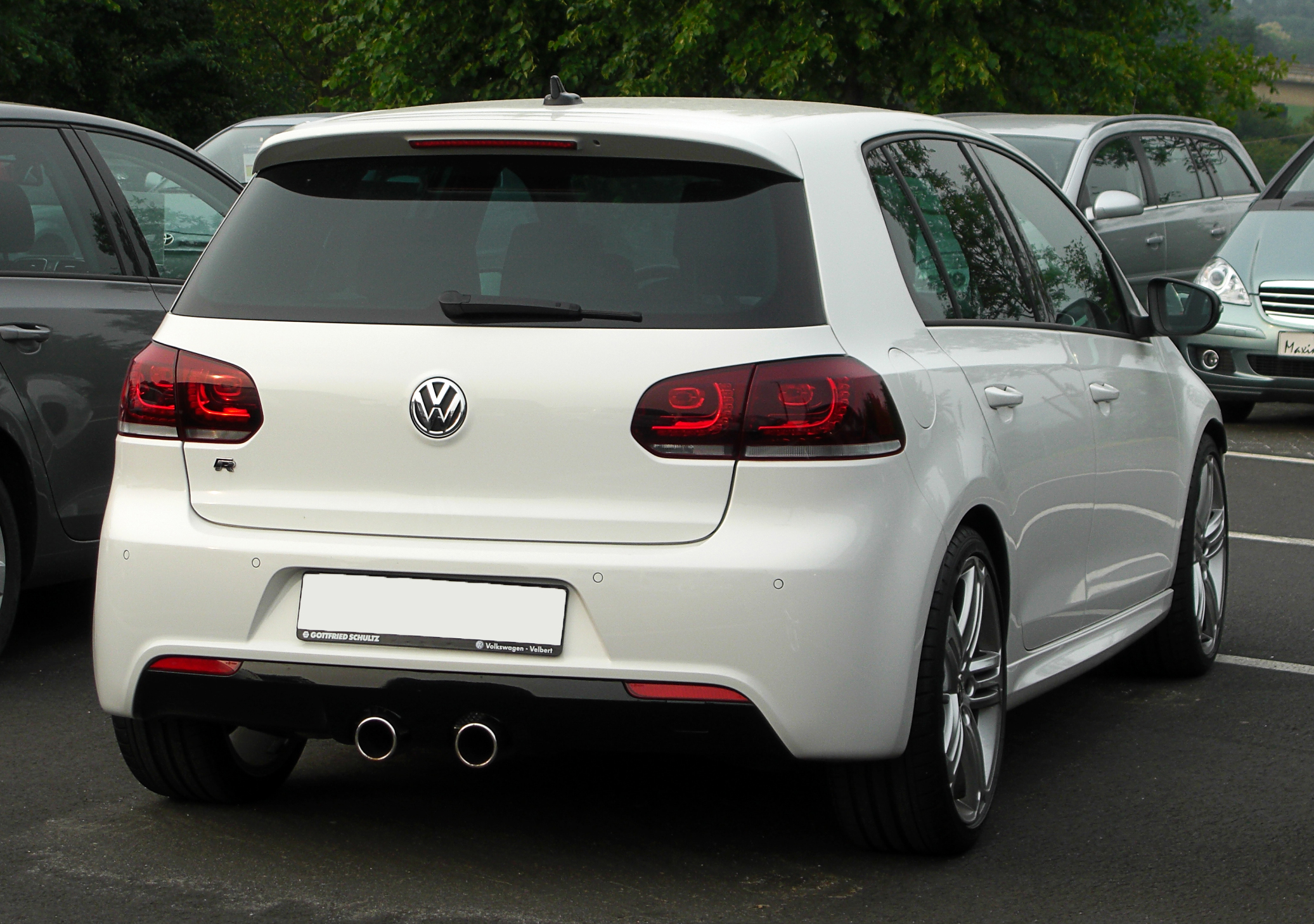 VW Golf R (VI)